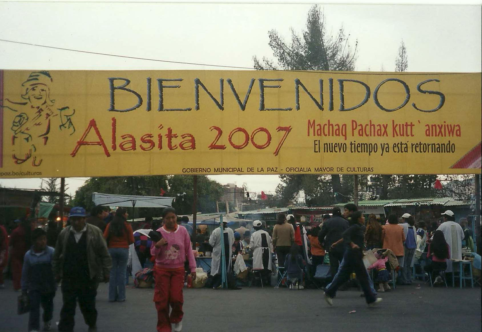 La feria de Alasitas de La Paz, en el año 2007.